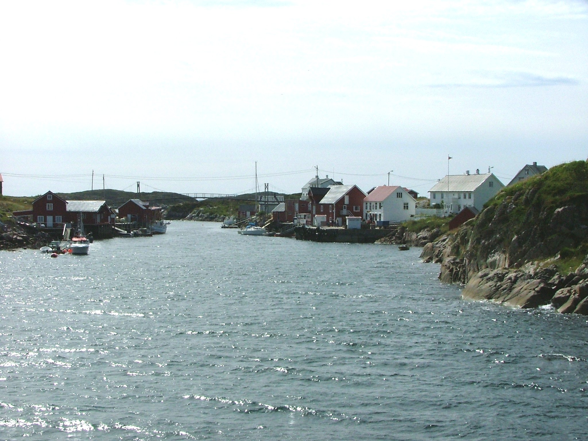 Picture of Bogøya, Frøya